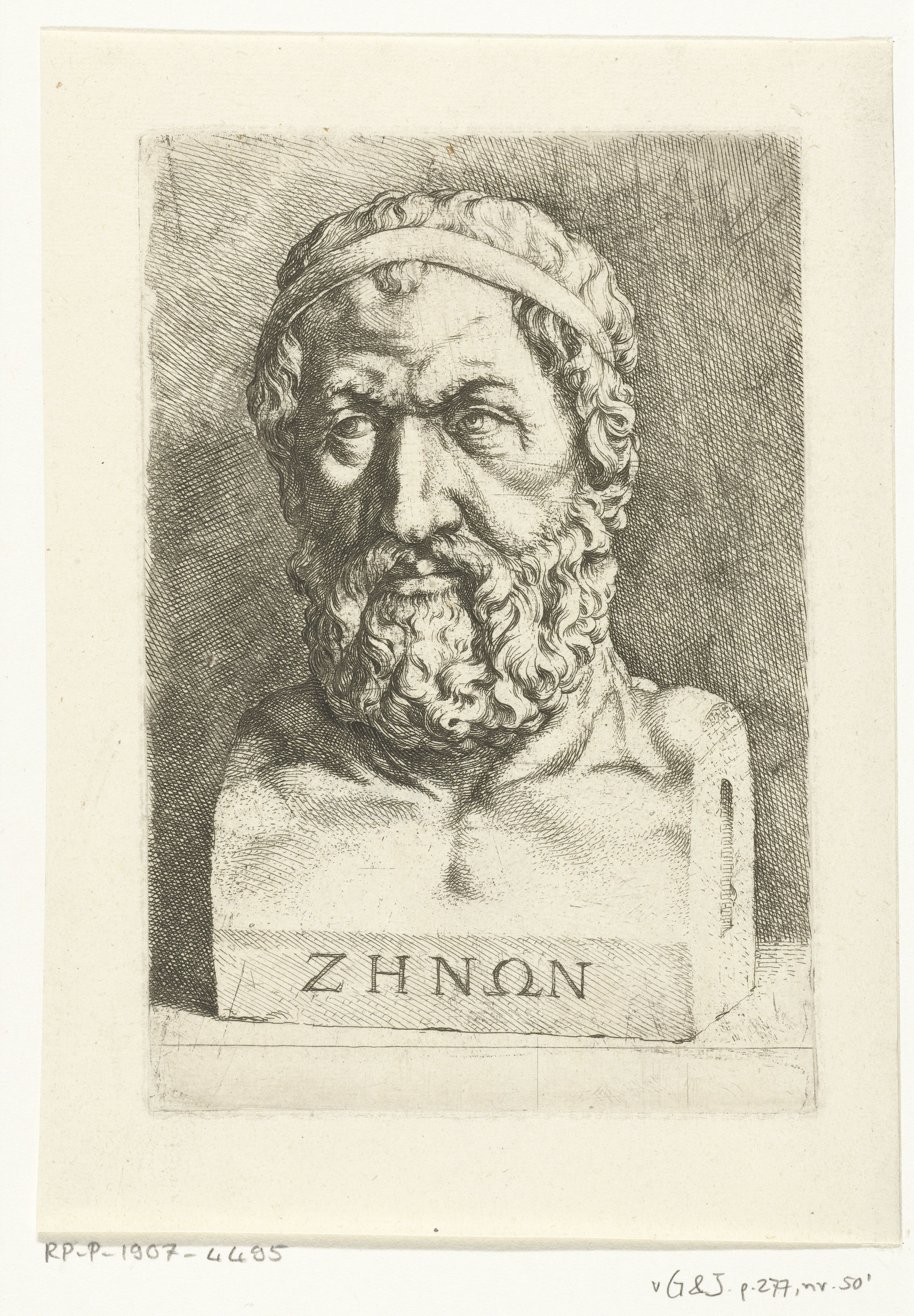 IdentificatieTitel(s): Portretbuste van Zeno van EleaParadigmata graphices variorum artificum (serietitel)Objecttype: prent Objectnummer: RP-P-1907-4495Catalogusreferentie: Hollstein Dutch 6Gelder&Jost 50-1(3)Opschriften / Merken: verzamelaarsmerk, verso, gestempeld: Lugt 2228VervaardigingVervaardiger: prentmaker: Jan de Bisschopnaar beeld van: anoniem (vermeld op object)Plaats vervaardiging: Noordelijke NederlandenDatering: 1666 - 1671Fysieke kenmerken: ets, proefdrukMateriaal: papier Techniek: etsenAfmetingen: plaatrand: h 150 mm × b 100 mmToelichtingafkomstig uit: Paradigmata graphices variorum artificum : voor-beelden der teken-konst van verscheyde meesters, (2e of latere editie)OnderwerpWie: Zeno van EleaVerwerving en rechtenVerwerving: aankoop 1907Copyright: Publiek domein